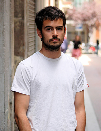 Pau Roca. Foto tomada por Jaime Puig